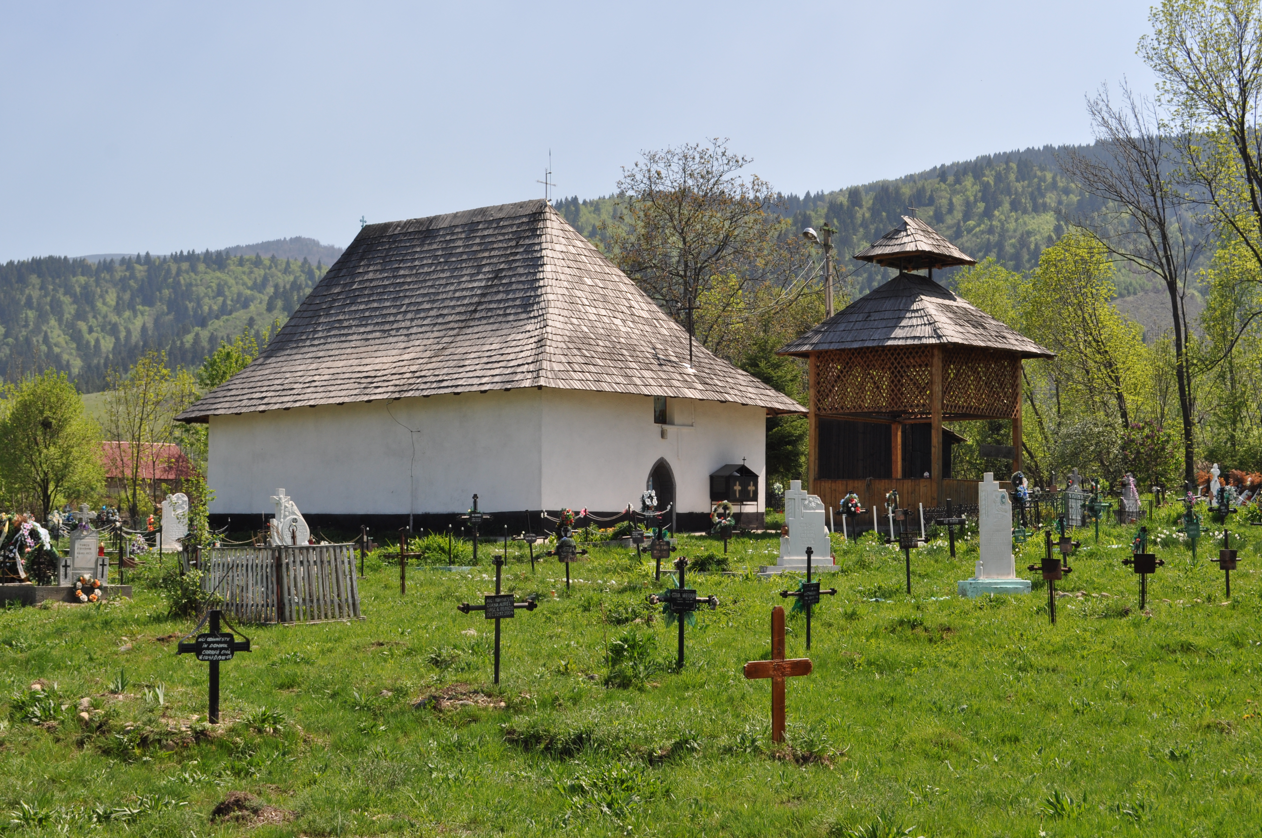 Biserica "Înălţarea Domnului" , sat NUCŞOARA; comuna SĂLAŞU DE SUS